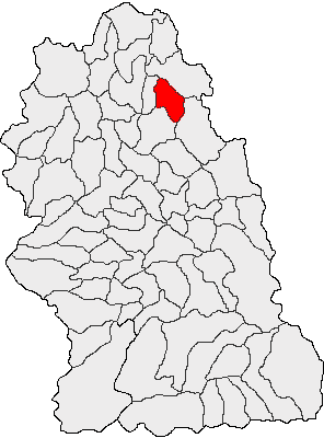 Categorie:Hărţi ale judeţului Hunedoara